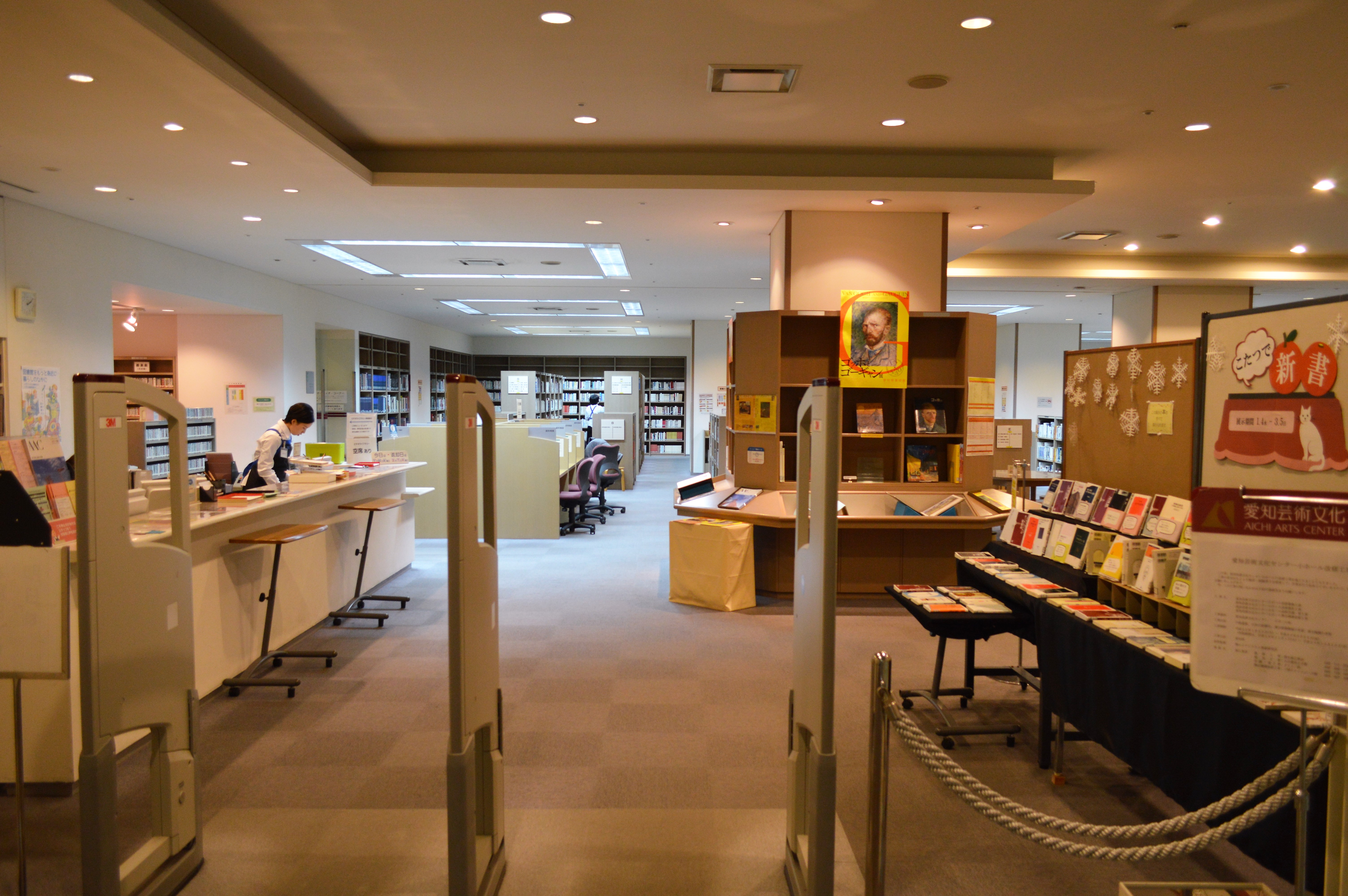 愛知県名古屋市東区東桜（栄）にある愛知芸術文化センターアートライブラリー。